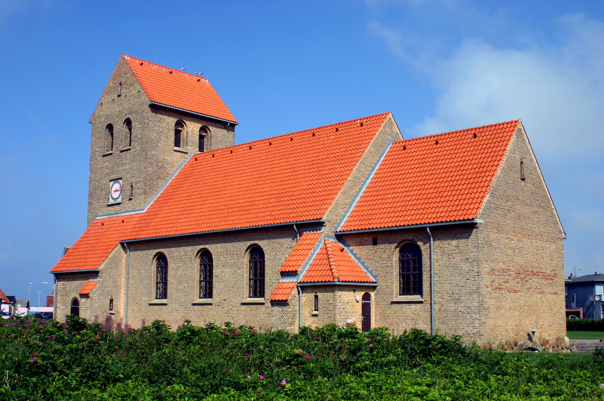 Hvide Sande, Denmark, Church, Helligåndskirken